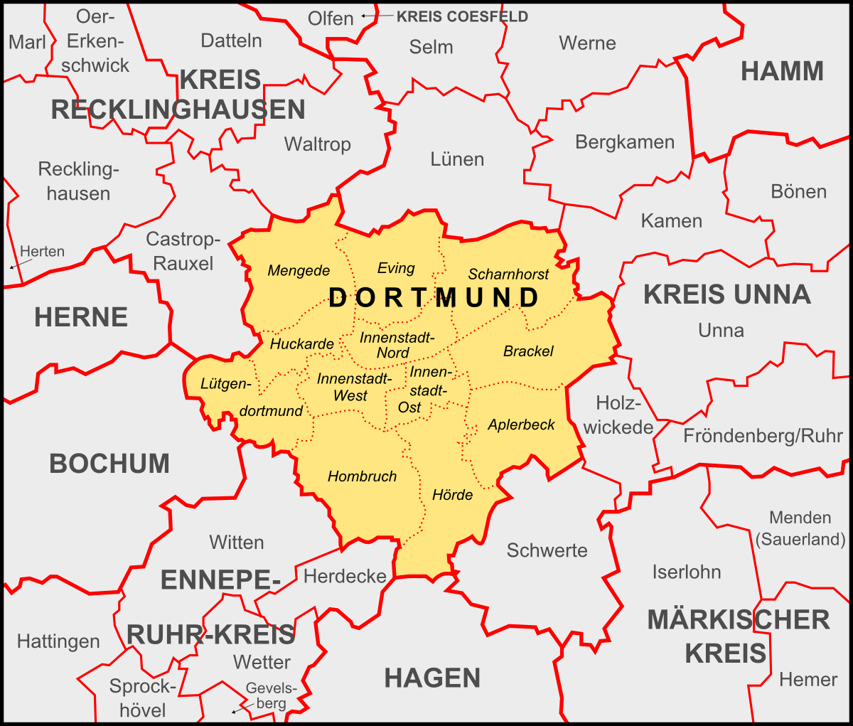 Bezirke in Dortmund, sowie Nachbargemeinden, Kreise und kreisfreie Städte